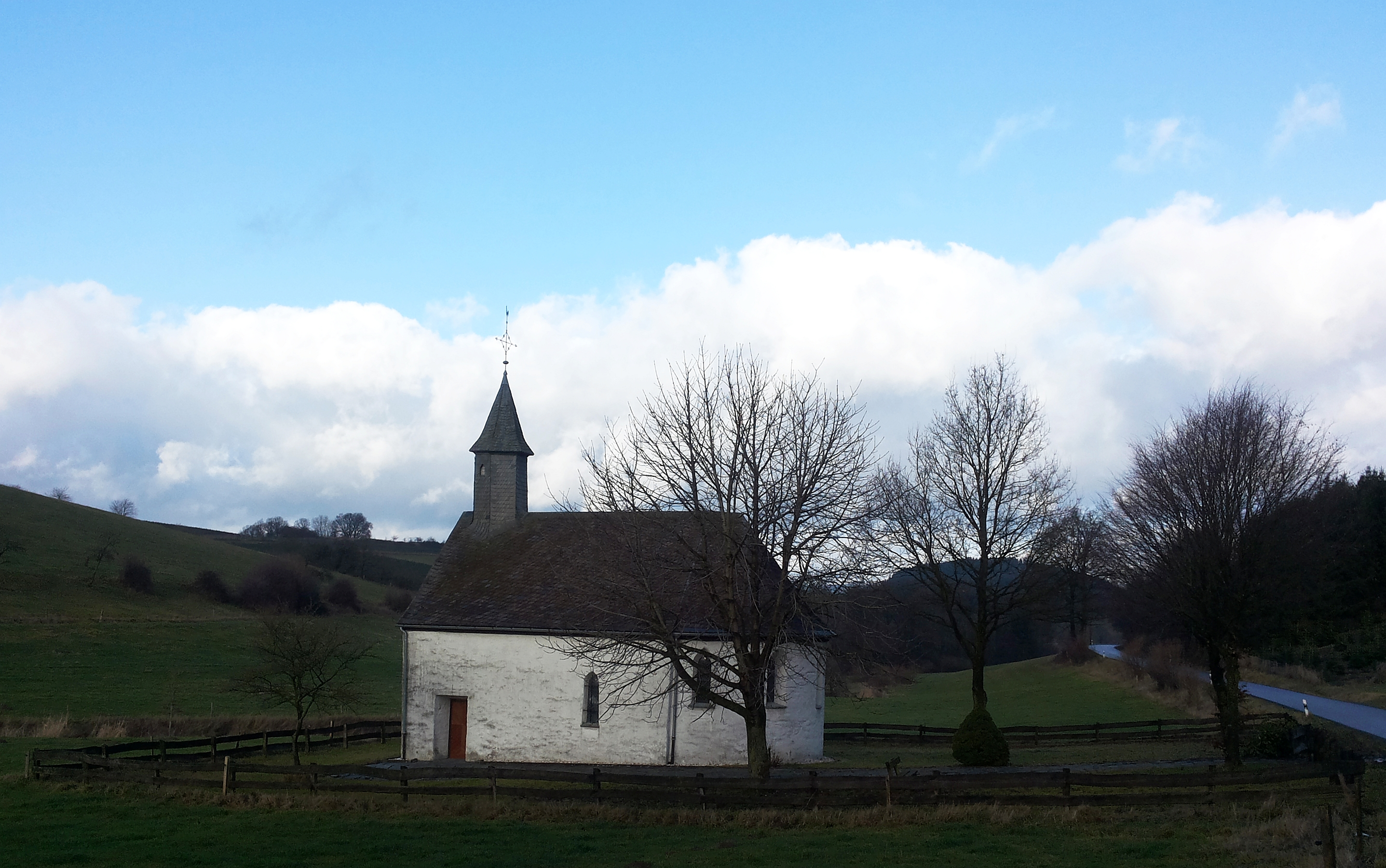 denkmalgeschützte Kapelle Hl. Drei Könige in Eslohe-Oberlandenbeck (Germany)